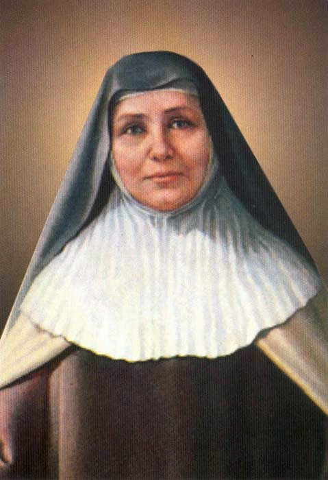 Блаженная Тереза Мария Креста (фрагмент картины, XX век). Автор неизвестен.